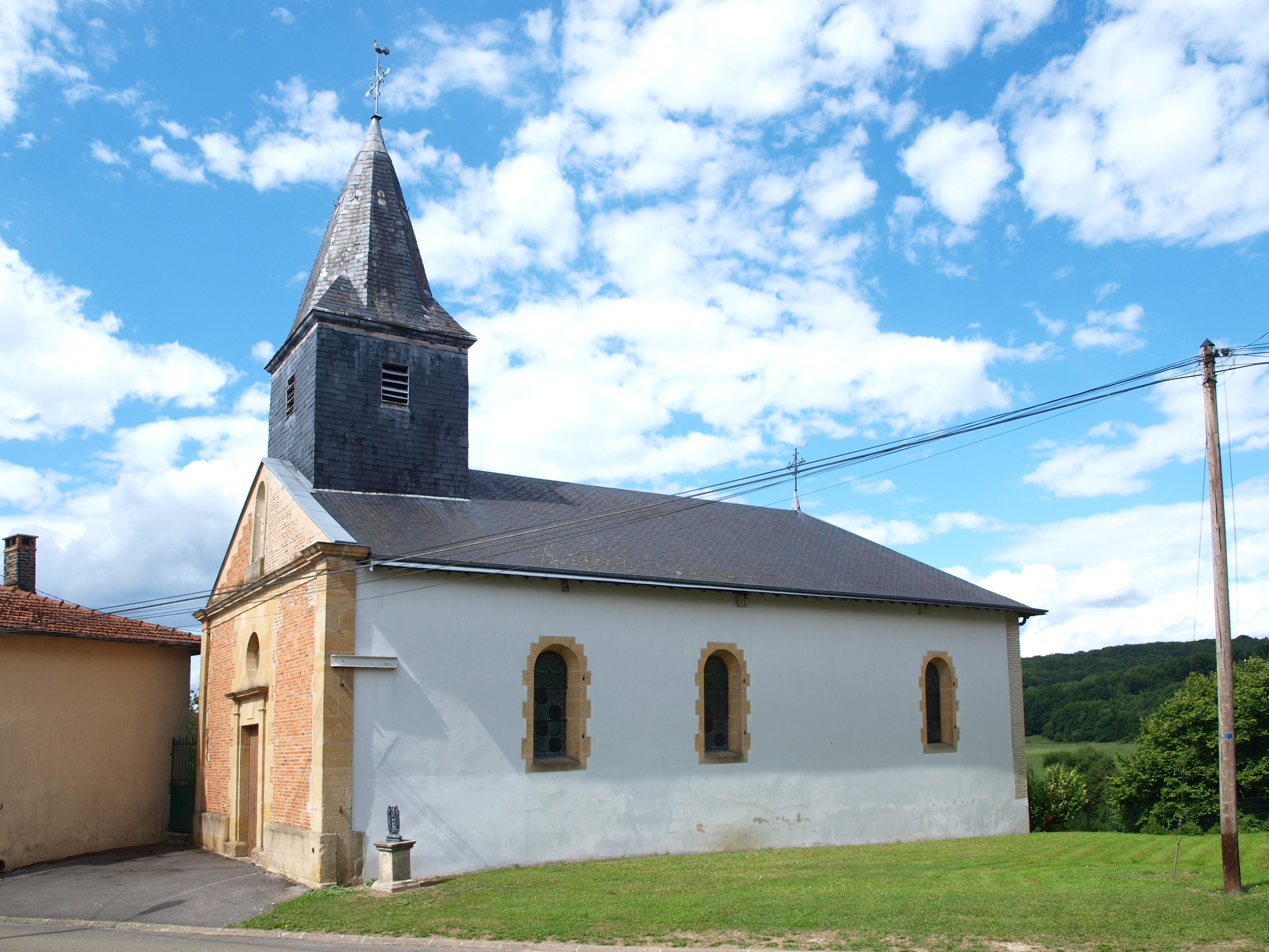 Grandham (Ardennes, France) ; église